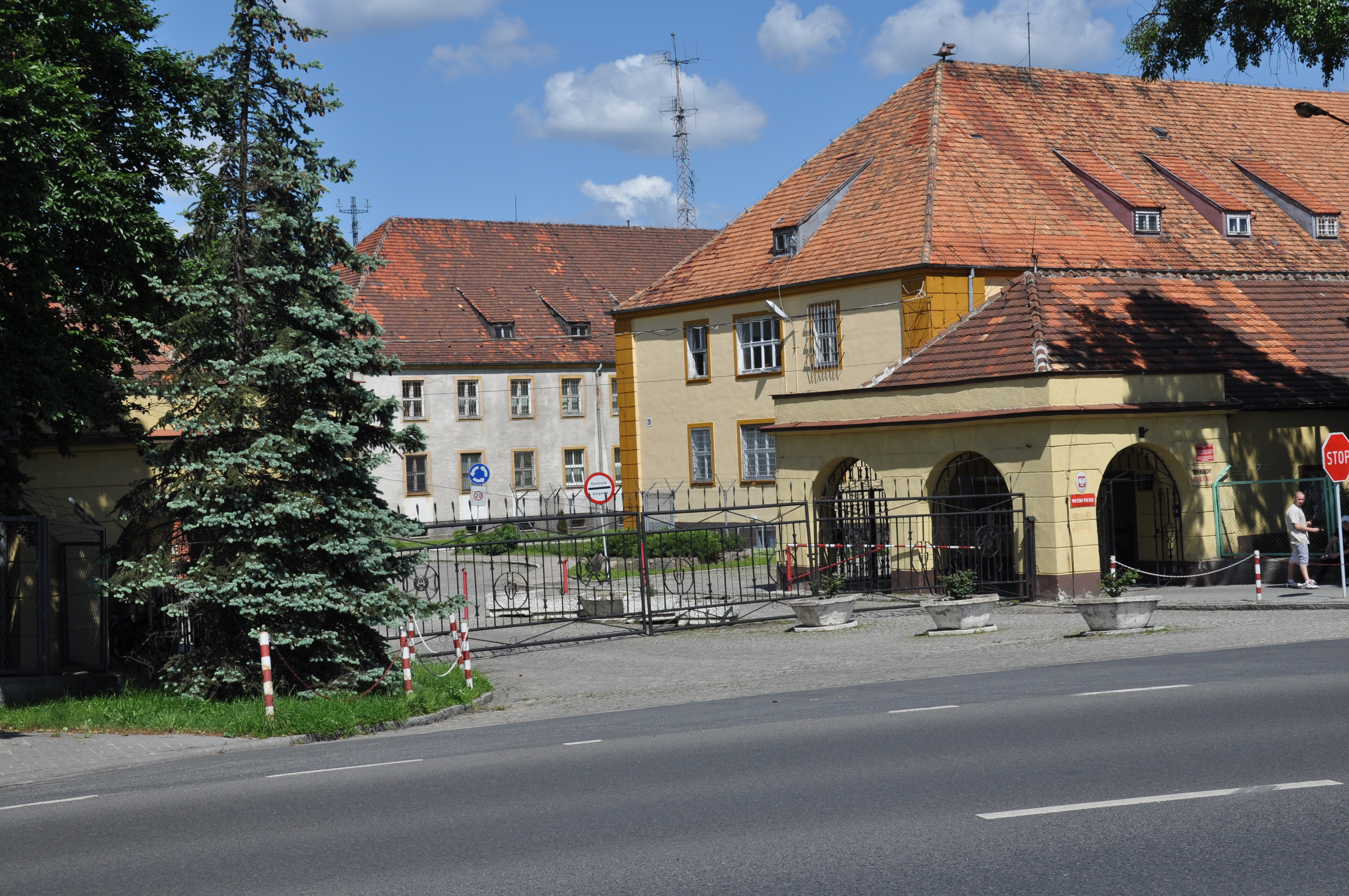 RWT w Krośnie Odrzańskim